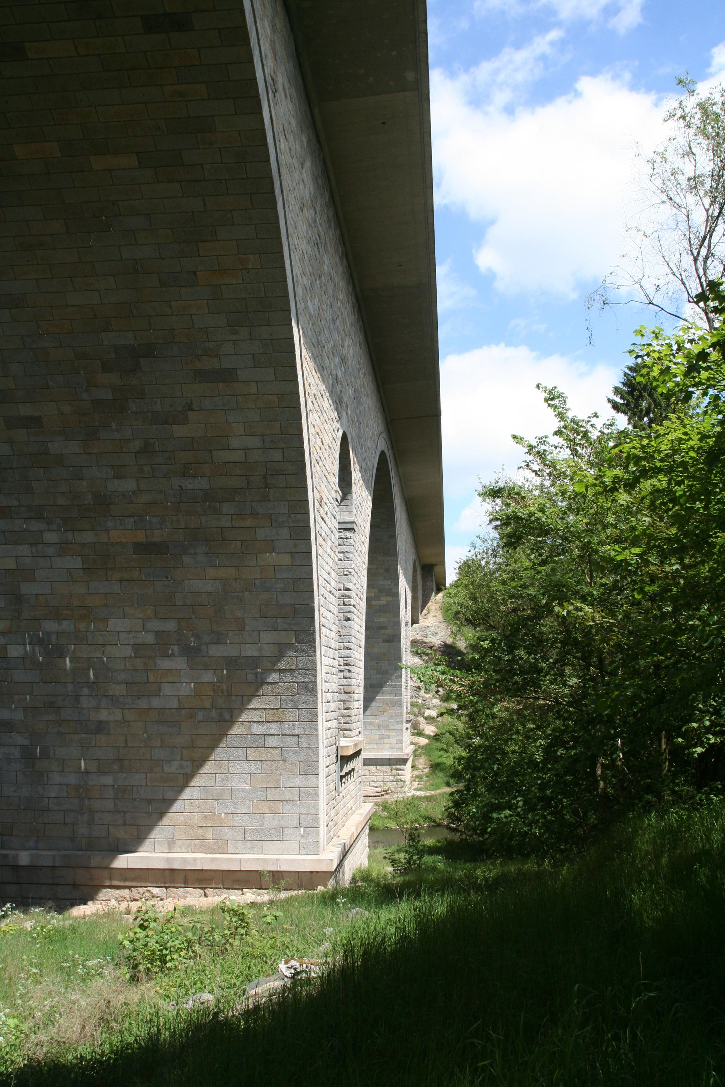 Saalebrücke der A72 bei Saalenstein, OT Köditz in Oberfranken